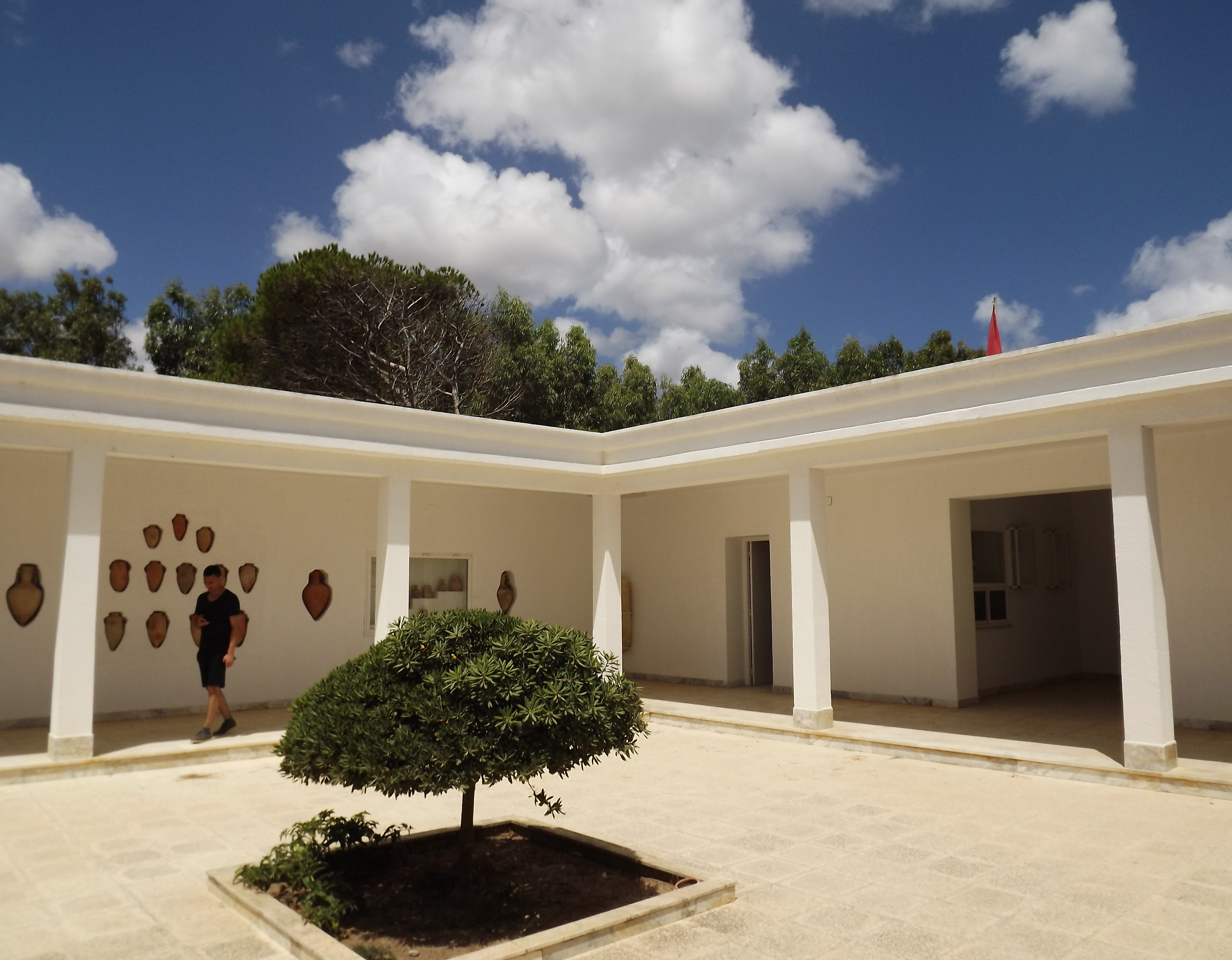 Musée de Kerkouane (Tunisie)